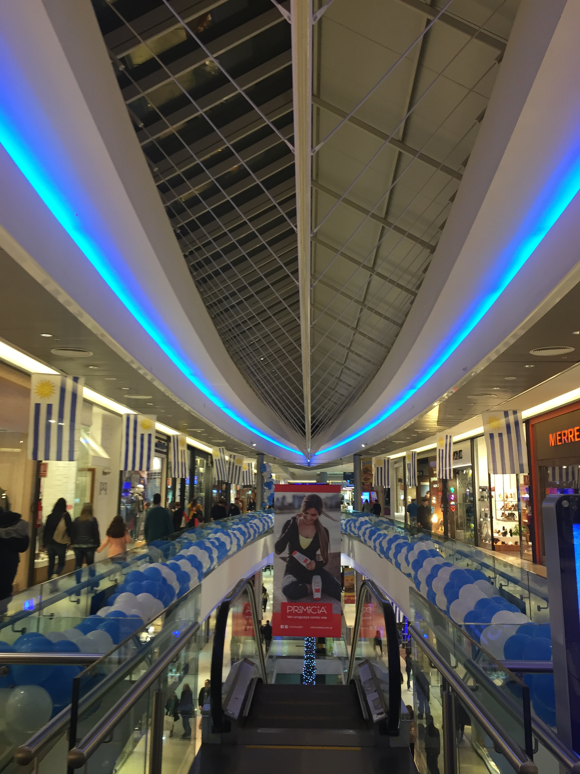 Nuevocentro Shopping engalanado de celeste en ocasión del Mundial de Rusia 2018.